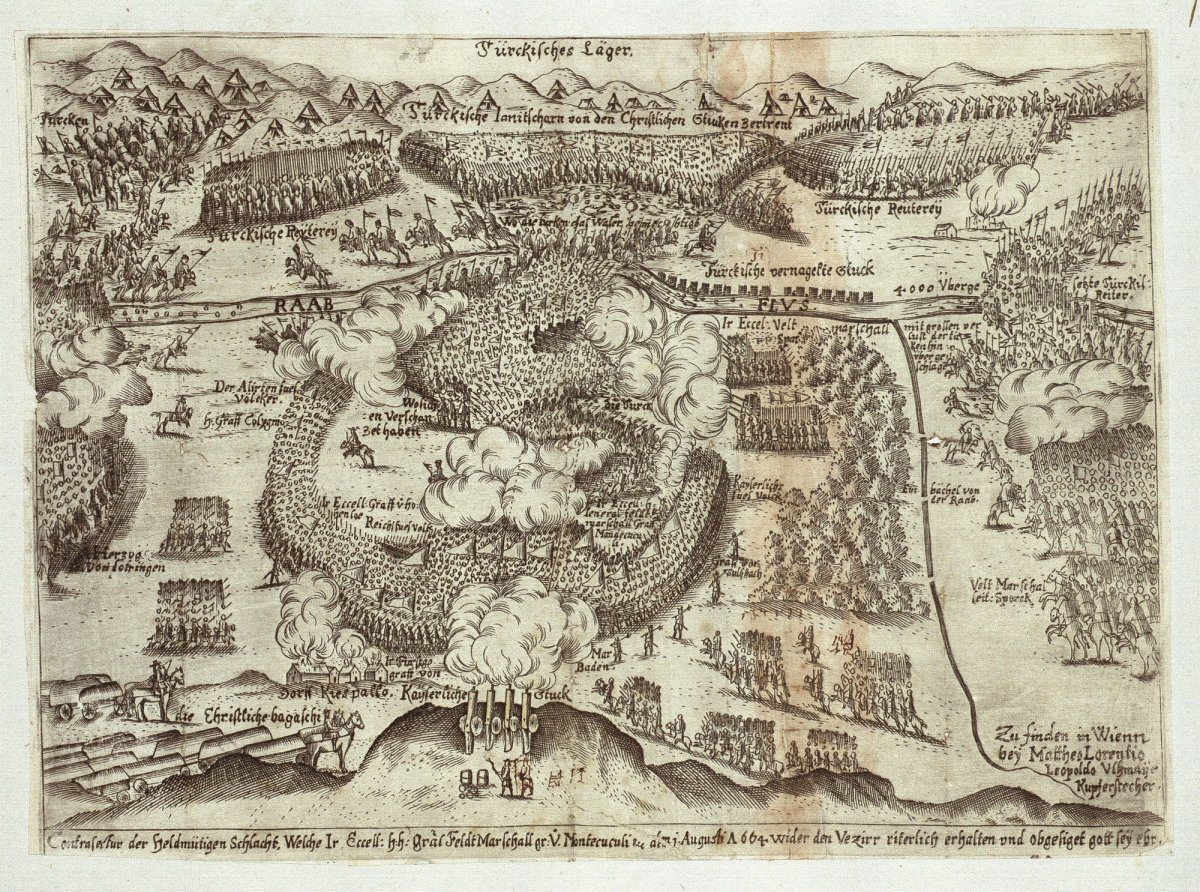 Kupferstich der Schlacht der kaiserlichen Truppen unter Feldmarschall Montecuculi gegen die Türken bei St. Gotthart (Szentgotthard) / Mogersdorf an der Raab, am 1. August 1664